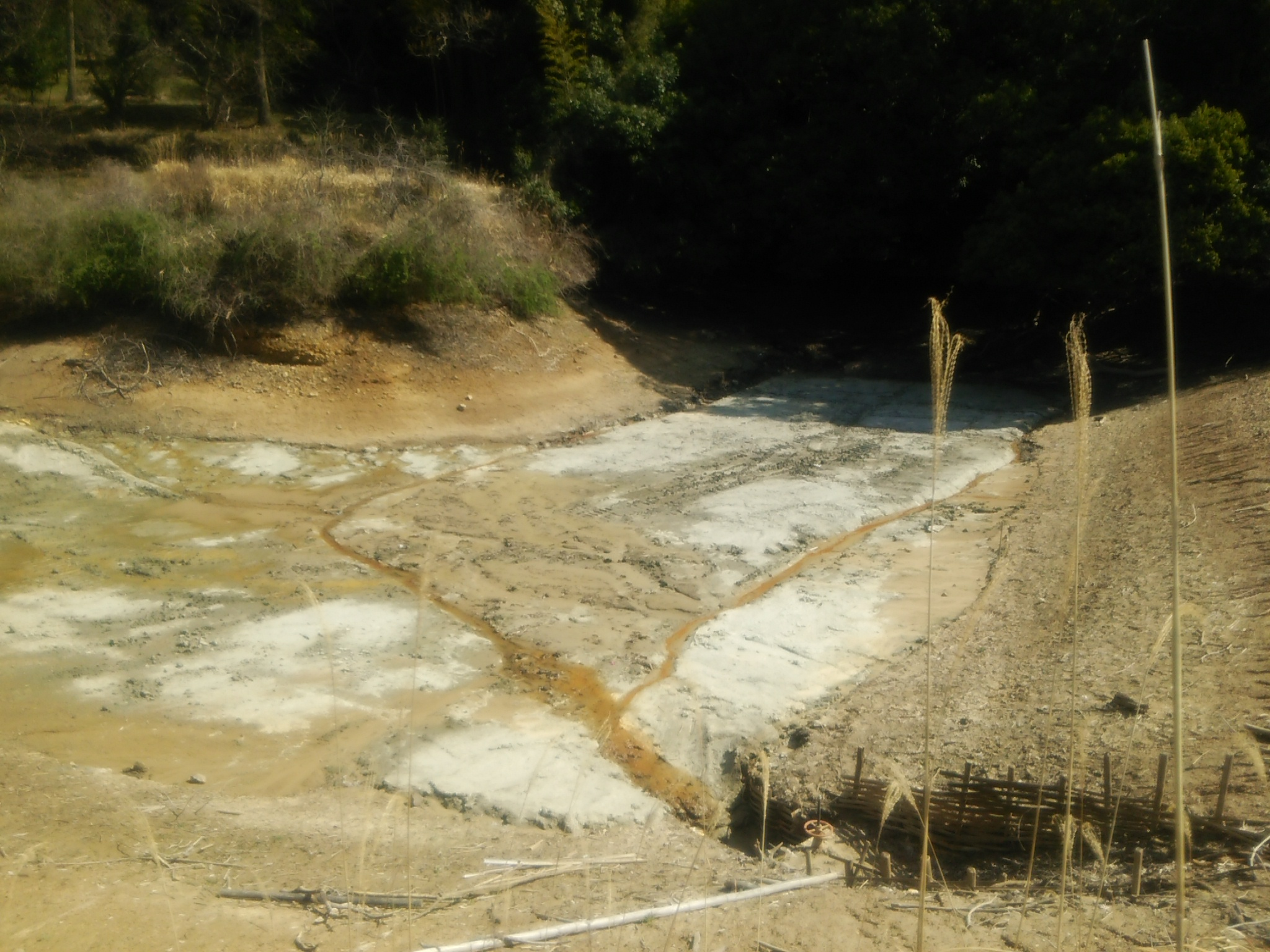 重要文化的景観「日根荘大木の農村景観」ー上大木の溜め池。農閑期のため水は抜かれているが、底部を粘土と砂利で固め浸透漏水を防ぎ、壁や給水口は柵（しがらみ）を編み込んでいることが判る